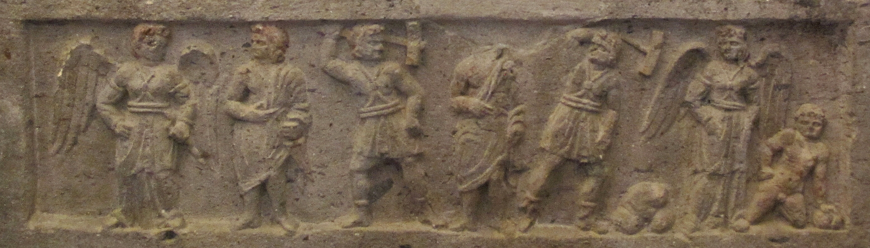 Sarcophage de Laris Pulena